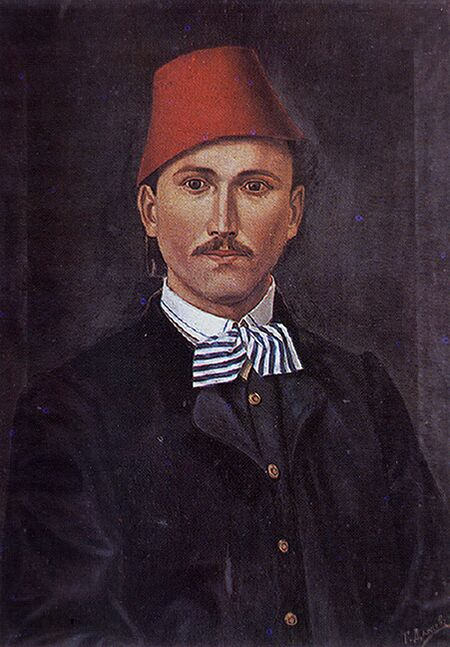 Georgi Dancov Zografina - self-portrait